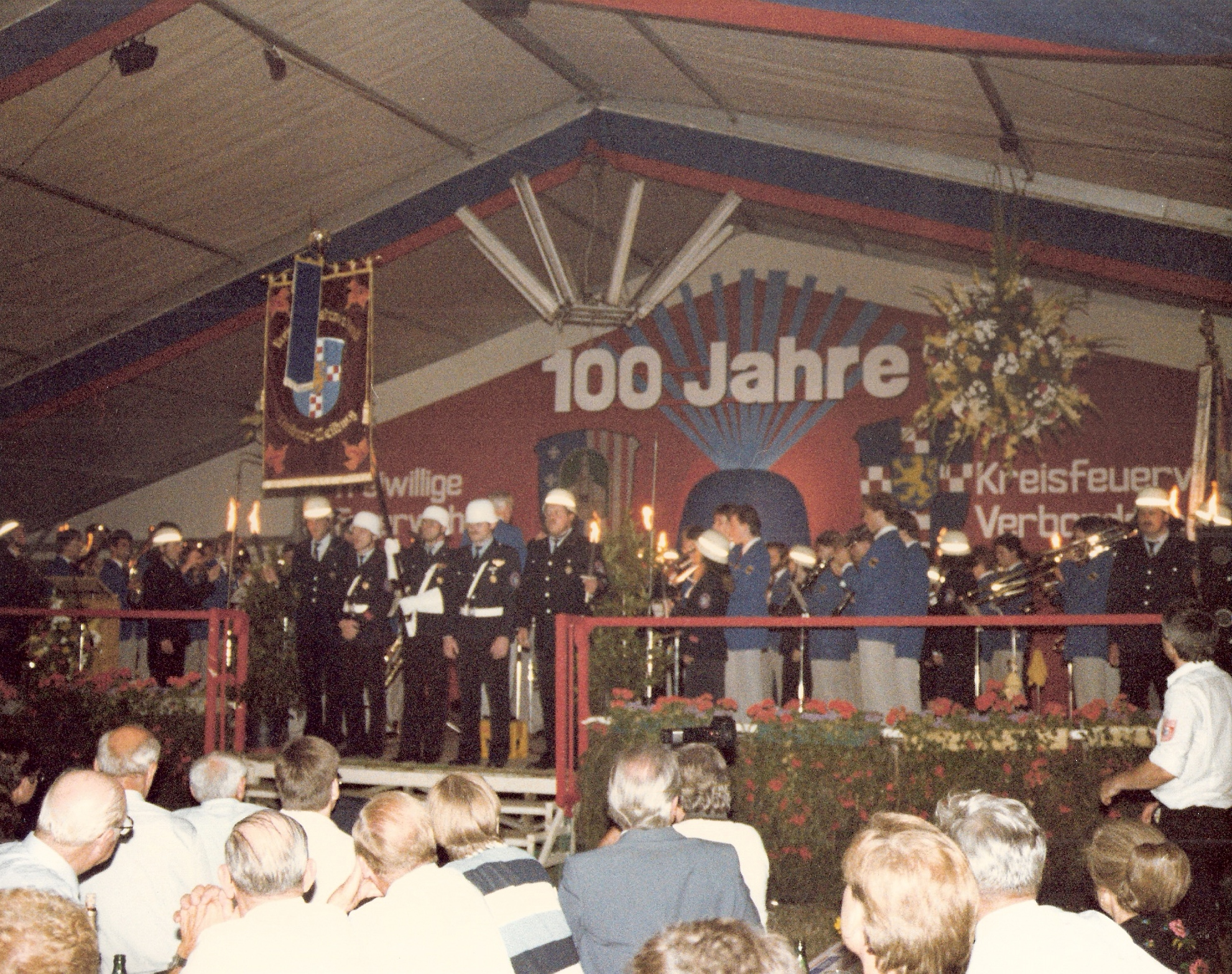 100 Jahre Freiwillige Feuerwehr Beselich-Obertiefenbach - Festkommers mit Zapfenstreich